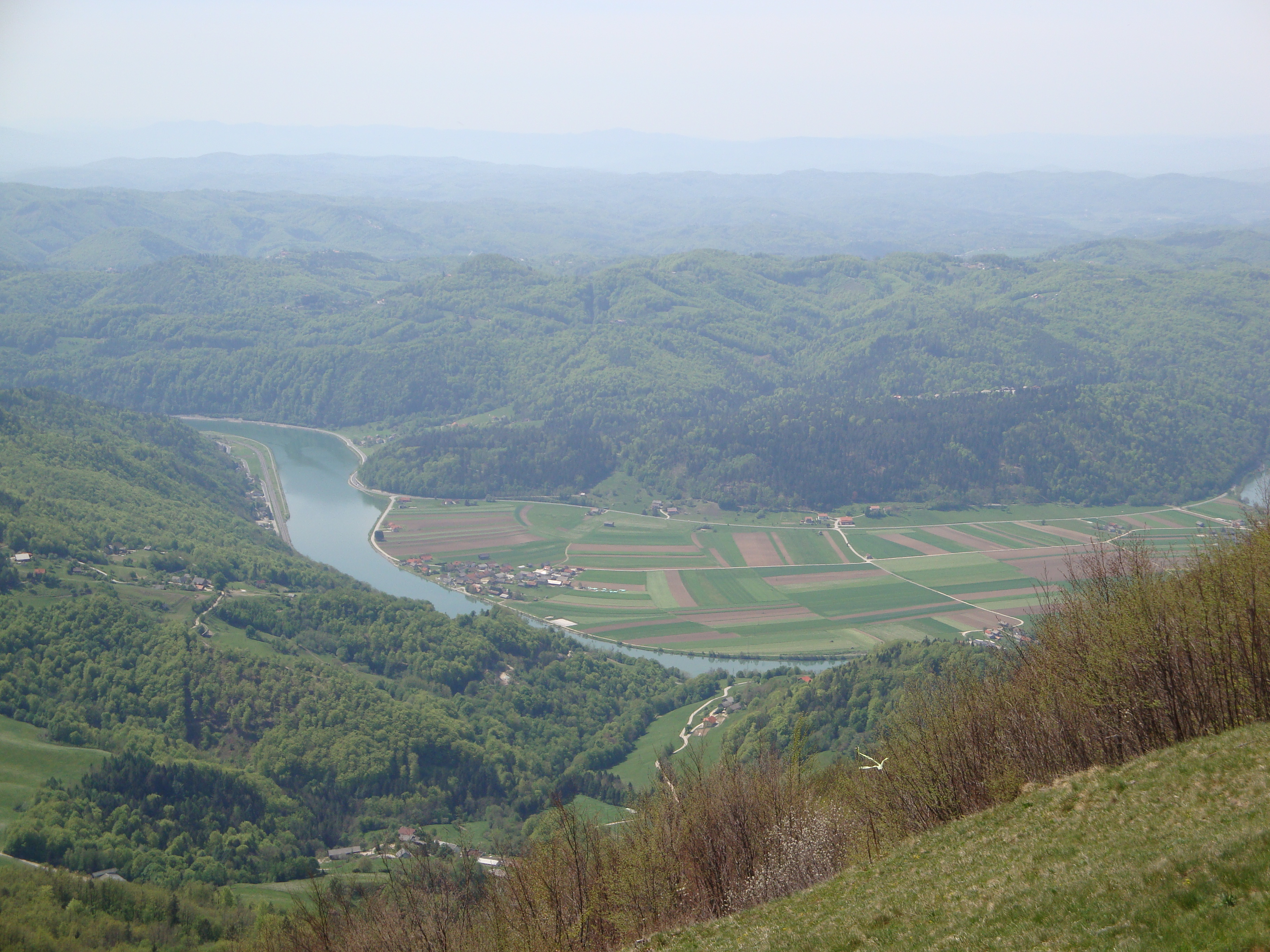 Kompolje v Občini Sevnica, Slovenija.